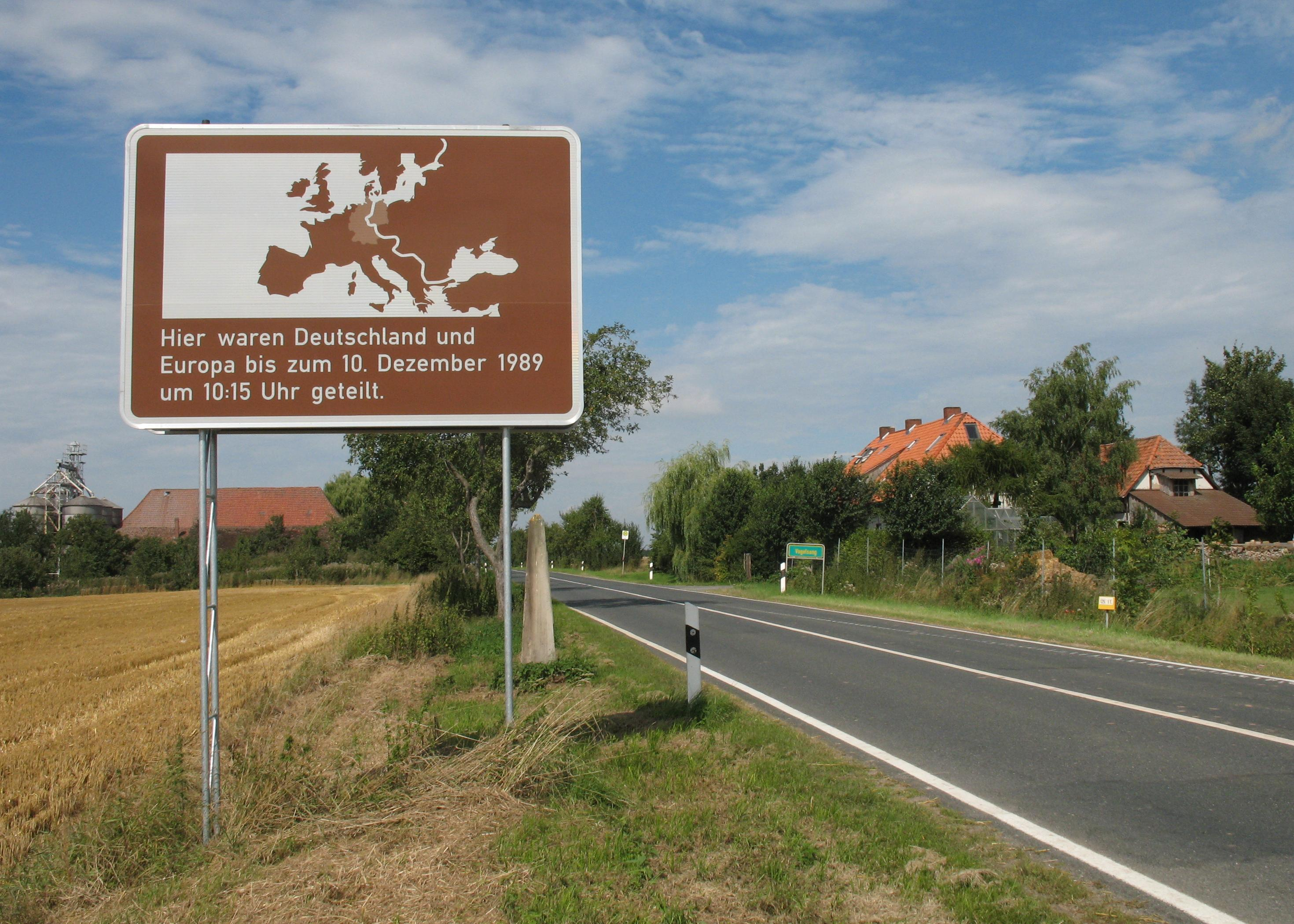 Unterrichtungstafel an der L1005 (bei km 1,1 südöstl. von Gleichen-Vogelsang) zwischen Bischhagen Thüringen und Bremke Niedersachsen, Deutschland